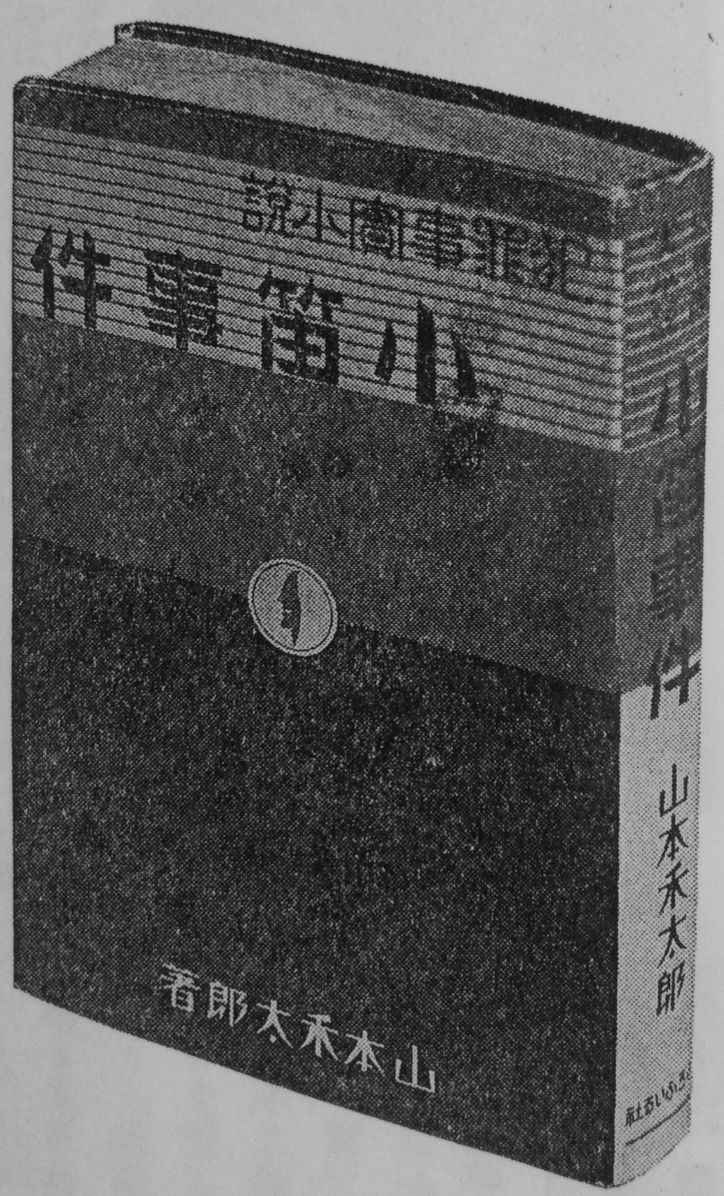 『小笛事件』単行本